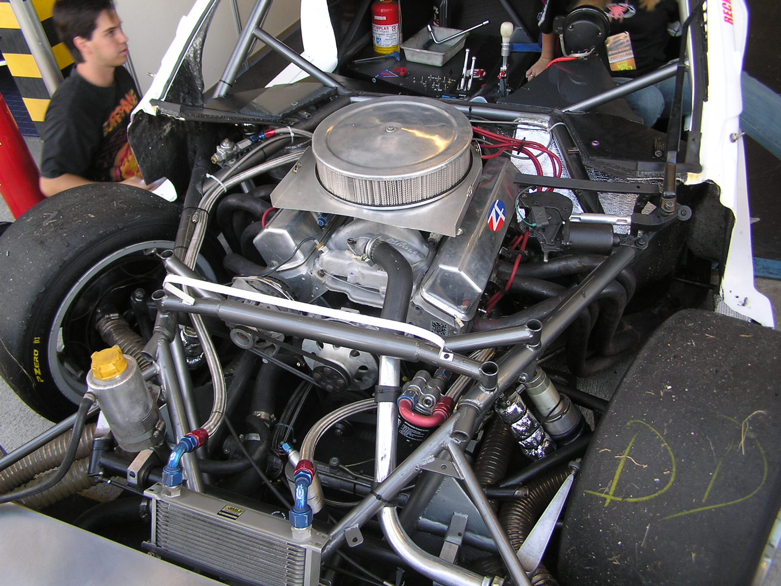 Stock Car V8 light: engine room.